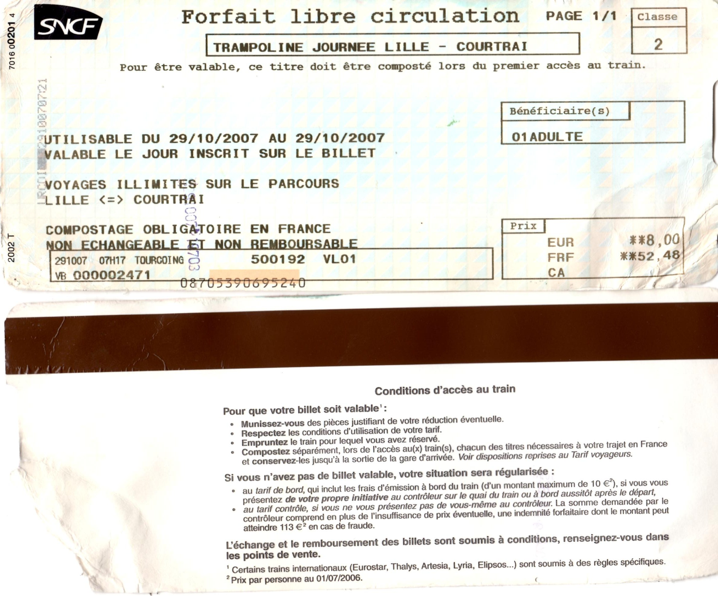 Ticket de train du Nord-Pas-de-Calais : billet Trampoline Lille - Courtrai, daté du 29 octobre 2007. Abîmé par l'eau suite à une sortie pluvieuse à Walibi Belgium.